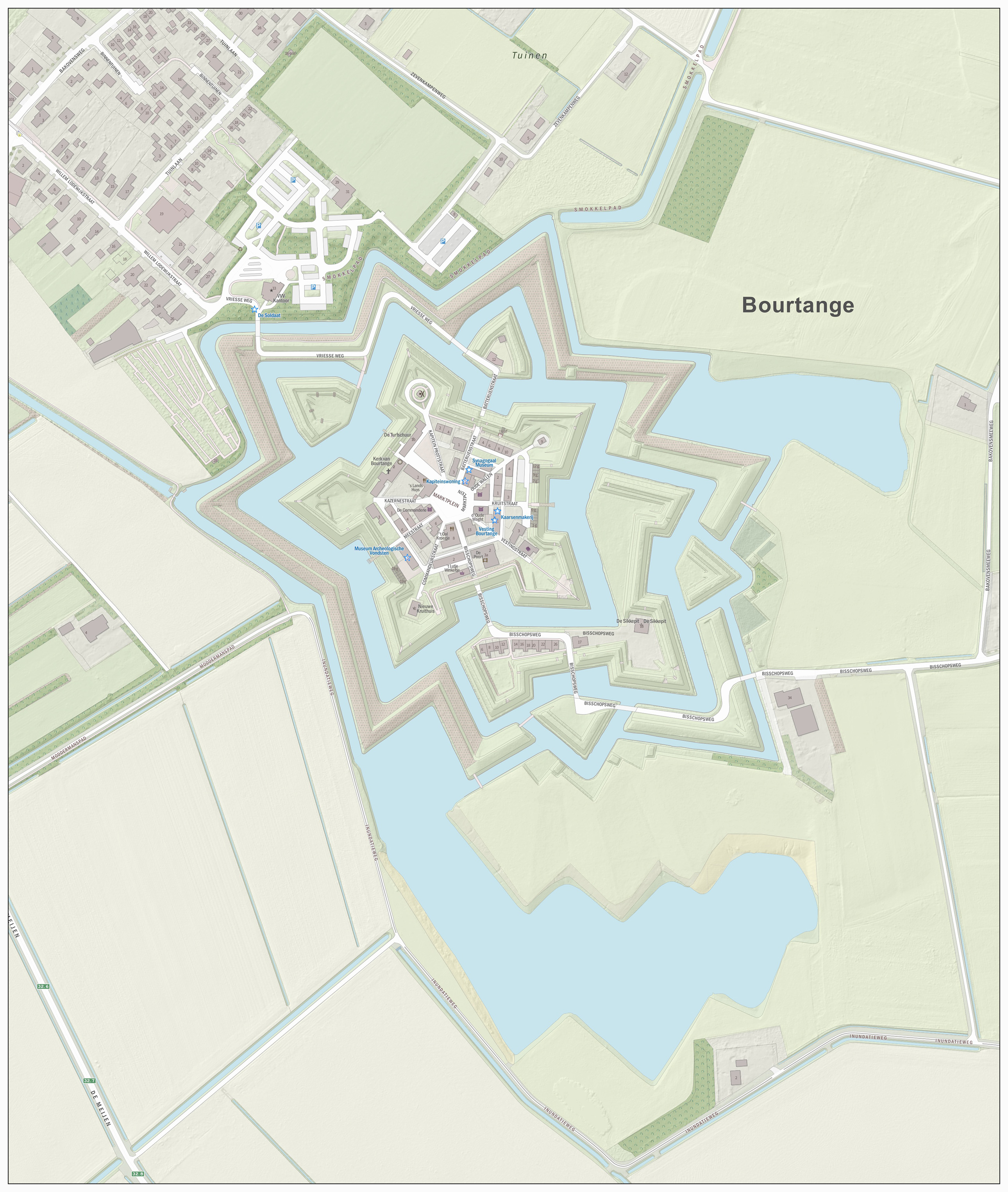 Topografische kaart van Bourtange (vesting). Resolutie: 2688 pixels/km. Kaartbeeld samengesteld uit de open geodata van de Basisregistratie Grootschalige Topografie (BGT), Creative Commons-BY Kadaster, en Top10NL en Top25namen (Basisregistratie Topografie, Kadaster), Creative Commons-BY Kadaster. Gebouwvlakken uit open geodata BAG extract, Creative Commons-BY Kadaster. Wegen uit de OpenStreetMap, CC-BY OpenStreetMap bijdragers. Reliëfschaduw uit de Actuele Hoogtekaart AHN2/AHN3. Samenstelling en kleurenschema: Jan-Willem van Aalst, met QGIS2. Zie ook de Legenda.